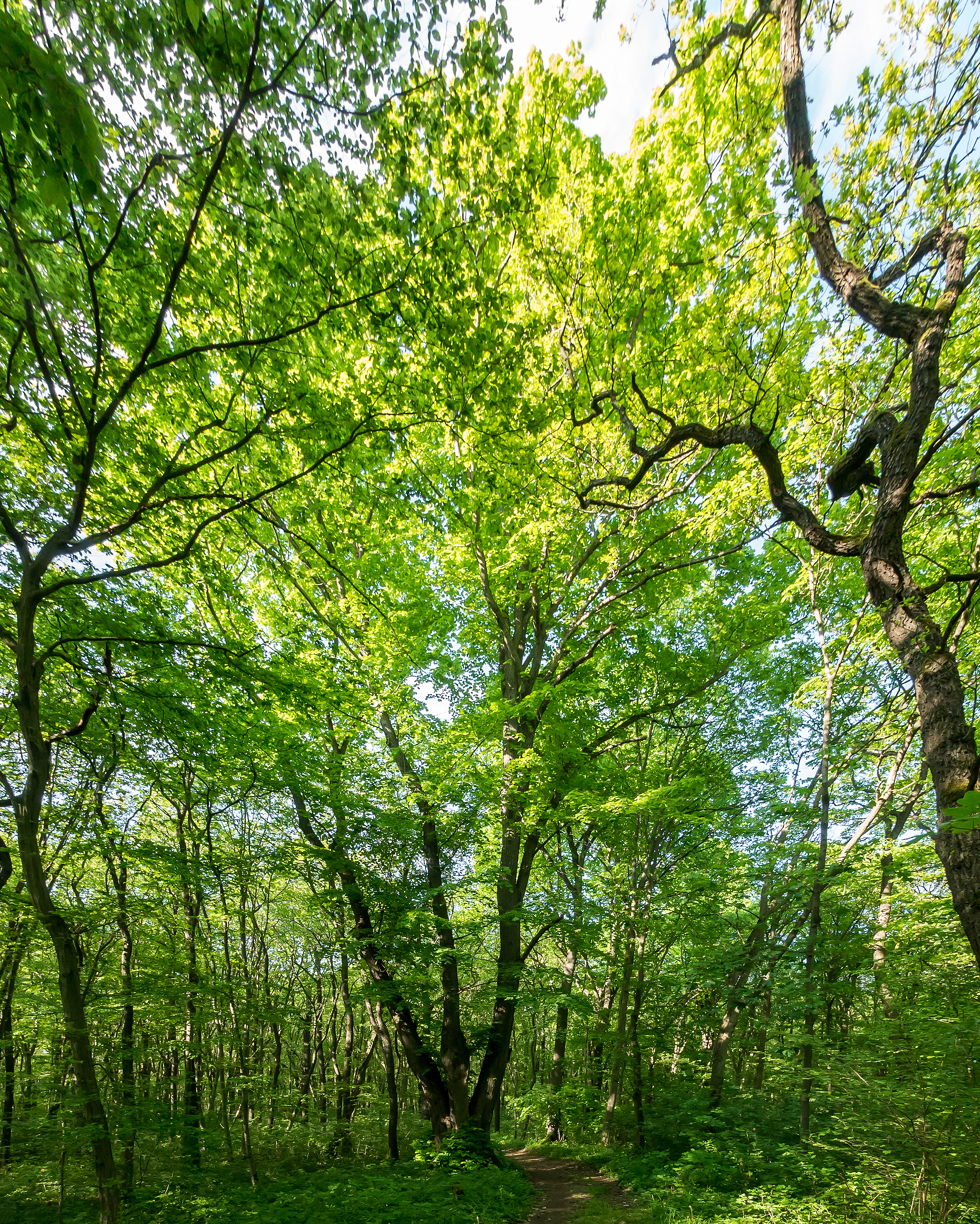 Brätzellinde Doc.-Nr. 1963-10 DE-TH Jena II